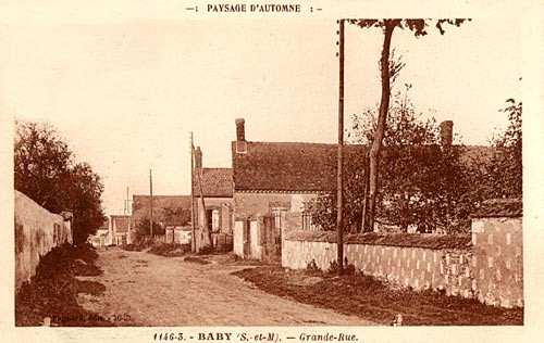 Baby au XIX siècle